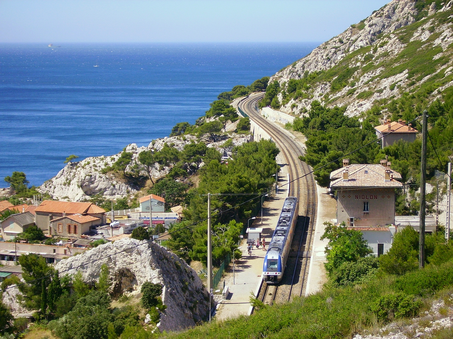 Un TER de Marseille à Miramas en gare de Niolon le 27 juillet 2010.